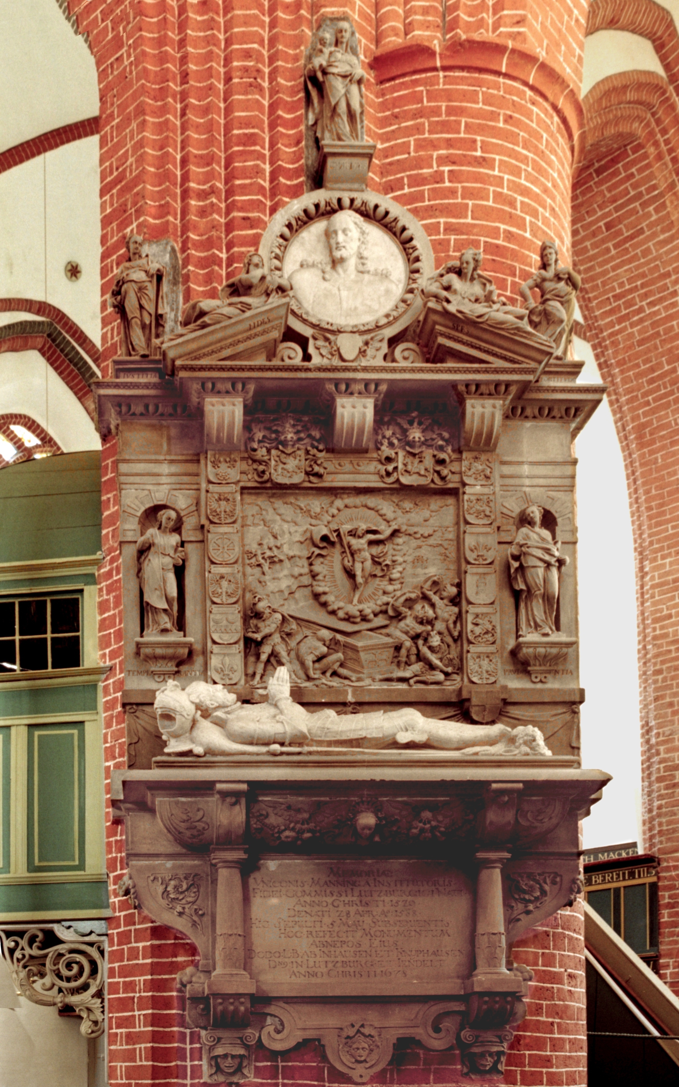 Grabmal des Unico Manninga am nordöstlichen Vierungspfeiler